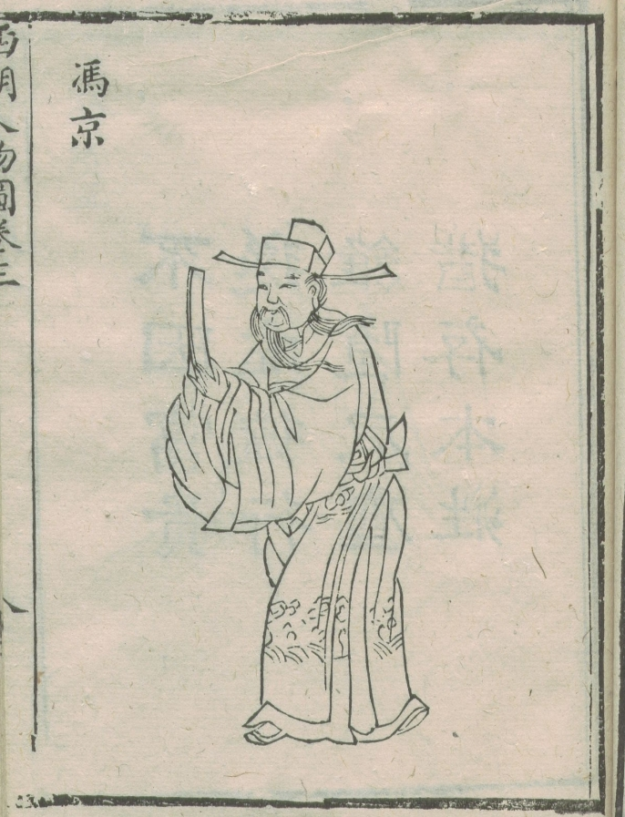 馮京（1021年－1094年4月20日），字當世，宋代咸寧人，生於廣西梧州